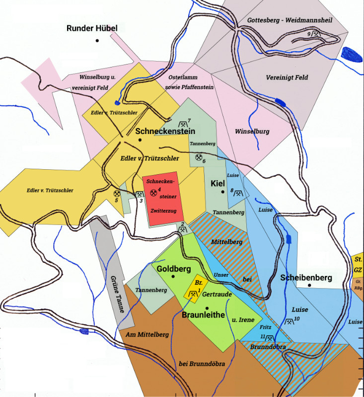 Schneckensteinrevier - Grubenfelder 1910–1928 01 = Tiefer Christbescherung Stolln 02 = Drei Brüder Stolln 03 = Friedrich August Stolln 04 = Siebenschläfer Schacht (Friedrich August) 05 = Vorderer Tannenberg Fundschacht 06 = Alter Tannenberg (Pingen) 07 = Falkensteiner Komun- oder Tranksteuer Stolln 08 = Himmelfahrt Stolln 09 = Wolfram Stolln 10 = Vitriol Stolln 11 = Treue Freundschaft Stolln Br. = GF Brunndöbra St. Gz. = GF Steindöbraer Glaskopfzeche Gr. RBg: = GF Am Grossen Rammelsberg